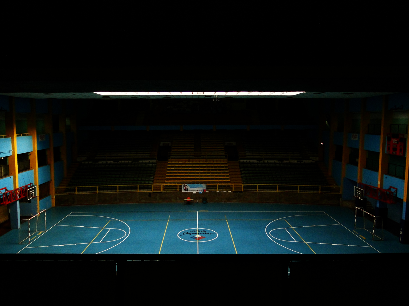 Estadio Víctor Jara This is a photo of a national monument in Chile: 2141